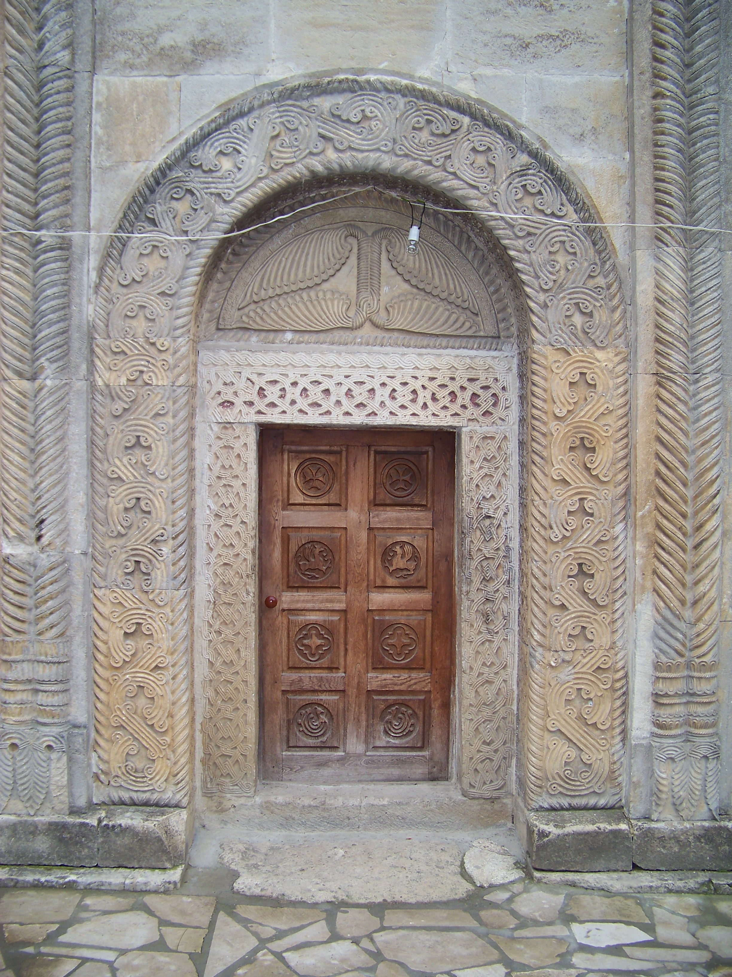 სავანის წმინდა გიორგის ეკლესია, სამრეკლო და სხვა ნაგებობანი